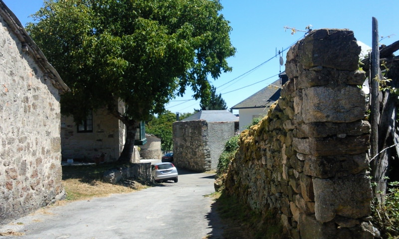 Mouruas (Ouresne)